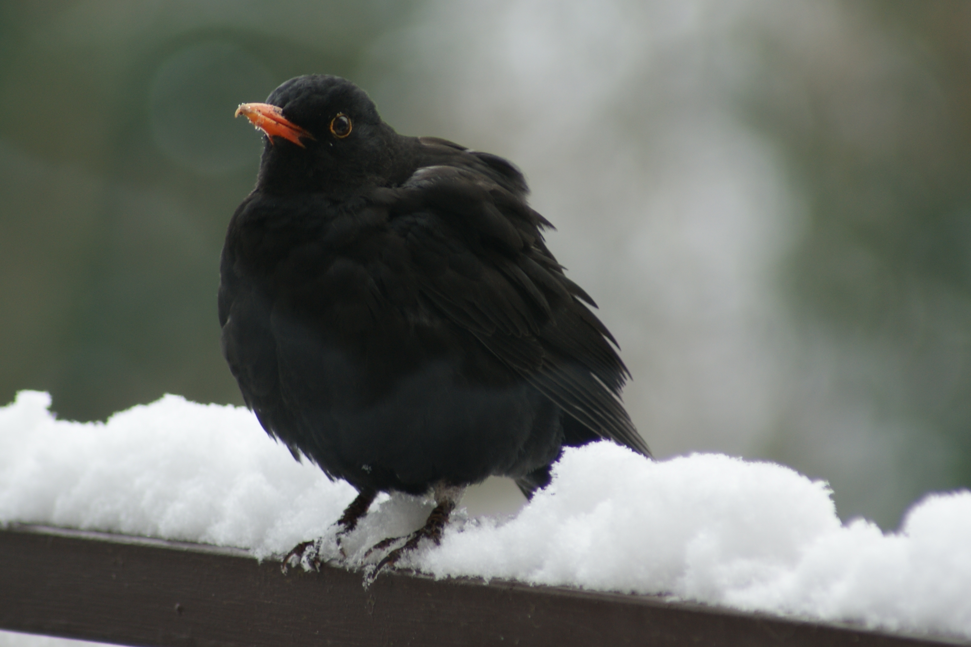 Amsel im Winter, während das Sturmtief Daisy über Deutschland zieht.Aufnahmeort: Erlangen